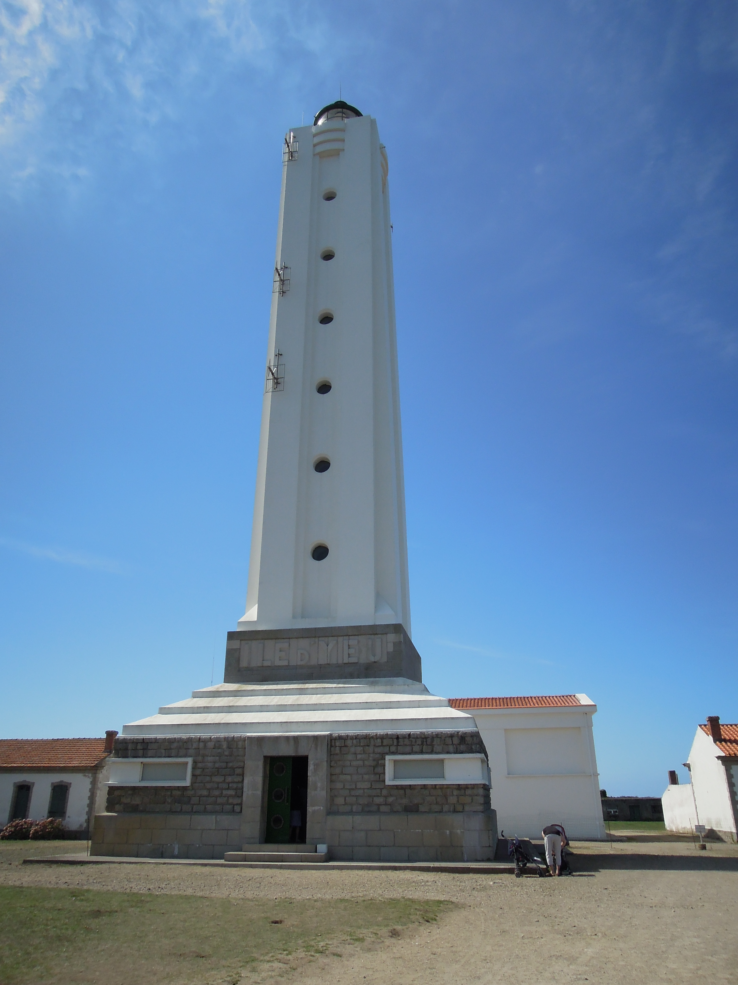 Grand Phare de l'ile d'Yeu